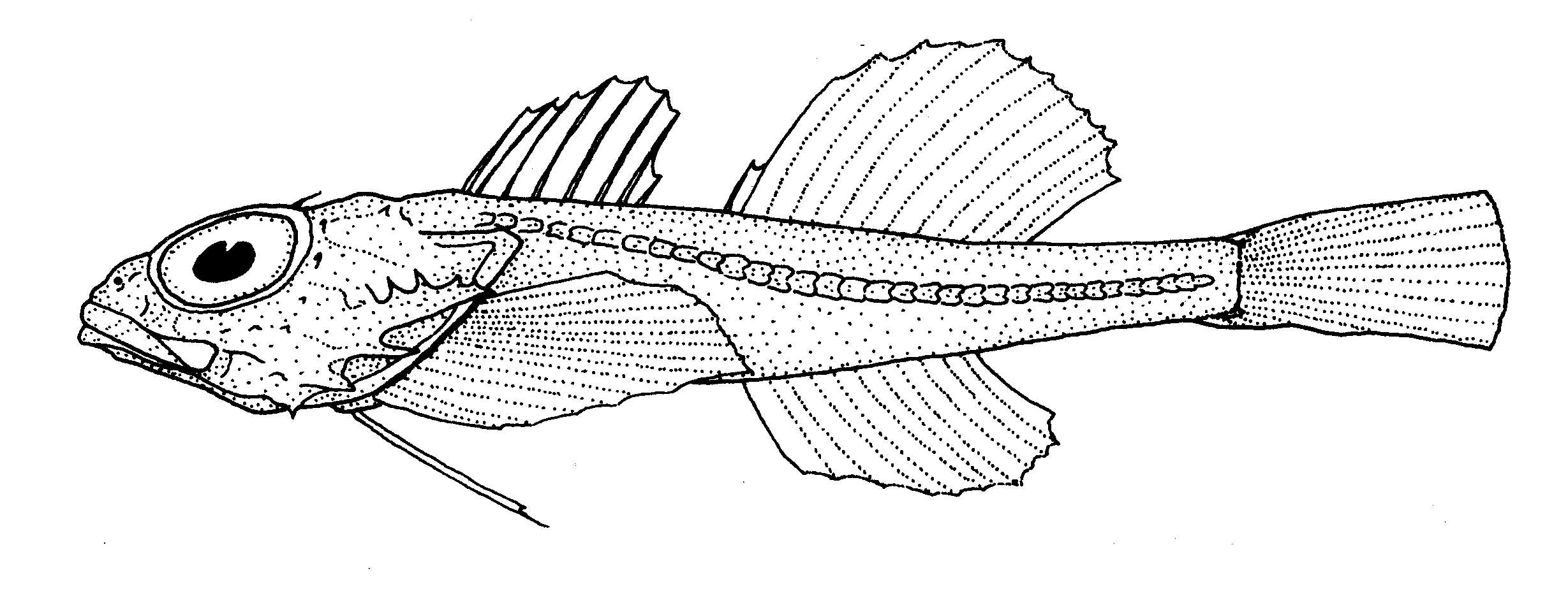 Antipodocottus megalops (no common name)